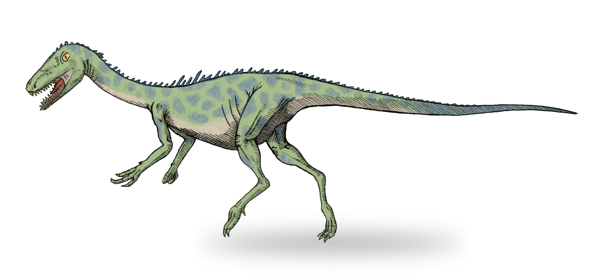 image by me user debivort, 12.06